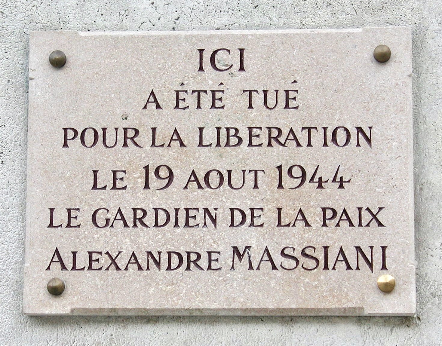 Panthéon de Paris, plaque posée sur un pilier de l'entourage du batiment.